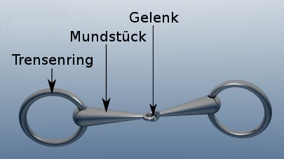 Trense